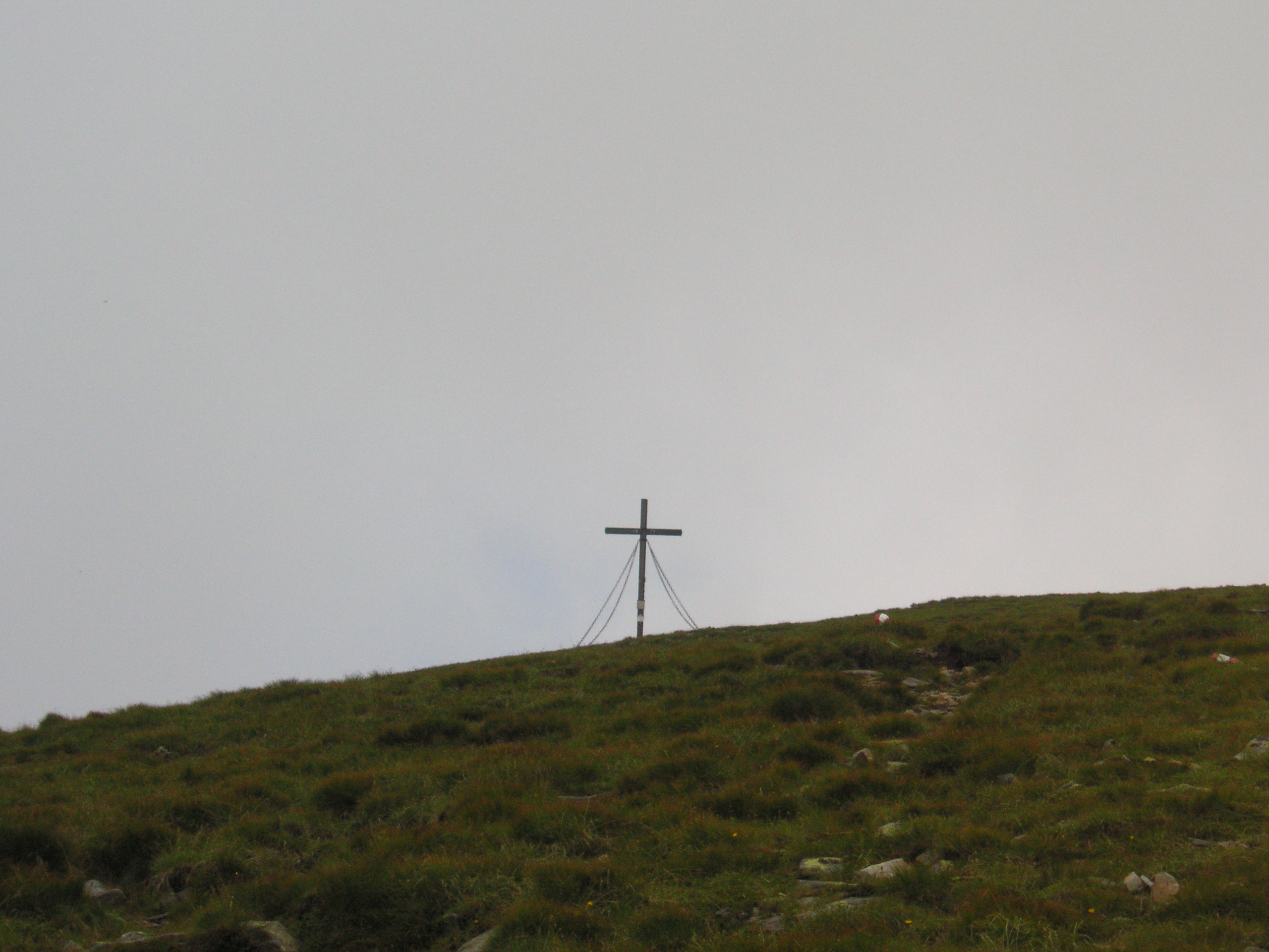 Das Gipfelkreuz des Gleinalpen-Speikkogels